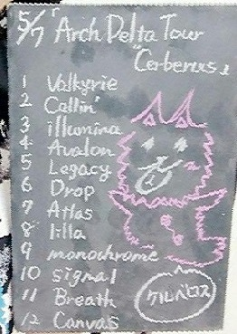 amiinAセトリボード(20170507(1))